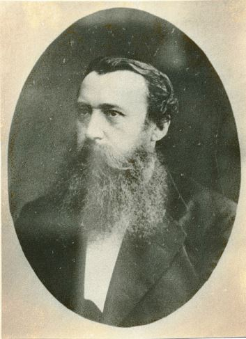 Porträtfotografie von Gustav von Salmuth